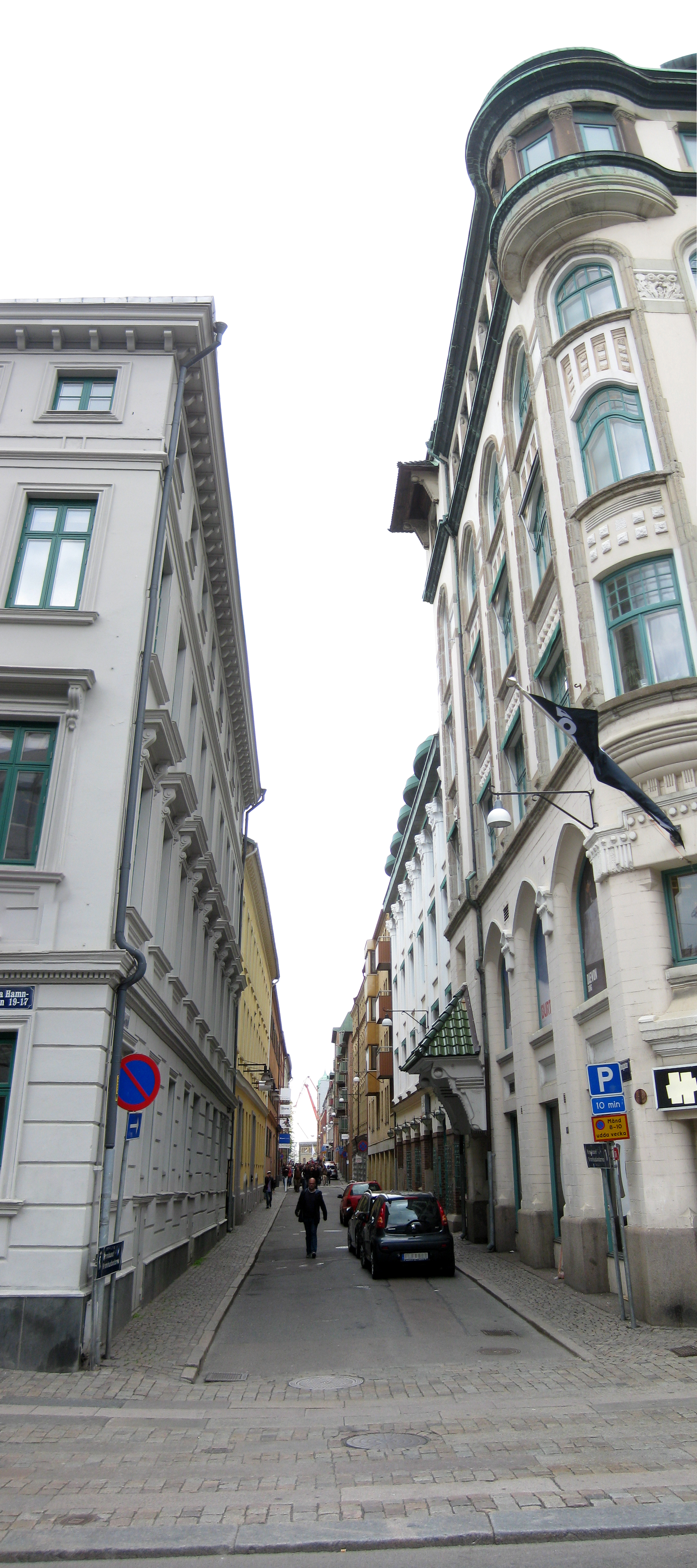 Kronhusgatan i Göteborg. Bilden är tagen från den östra änden av gatan.